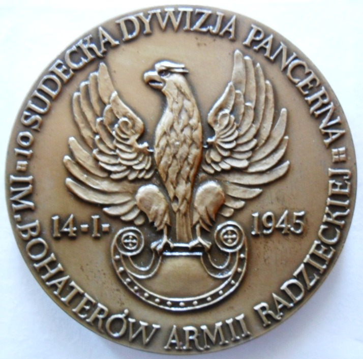 Medal pamiątkowy 10 SDP